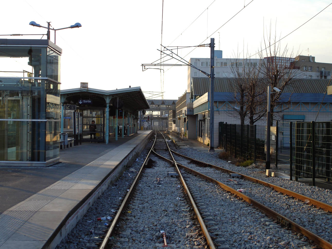 Gare de Bondy (Seine-Saint-Denis), France